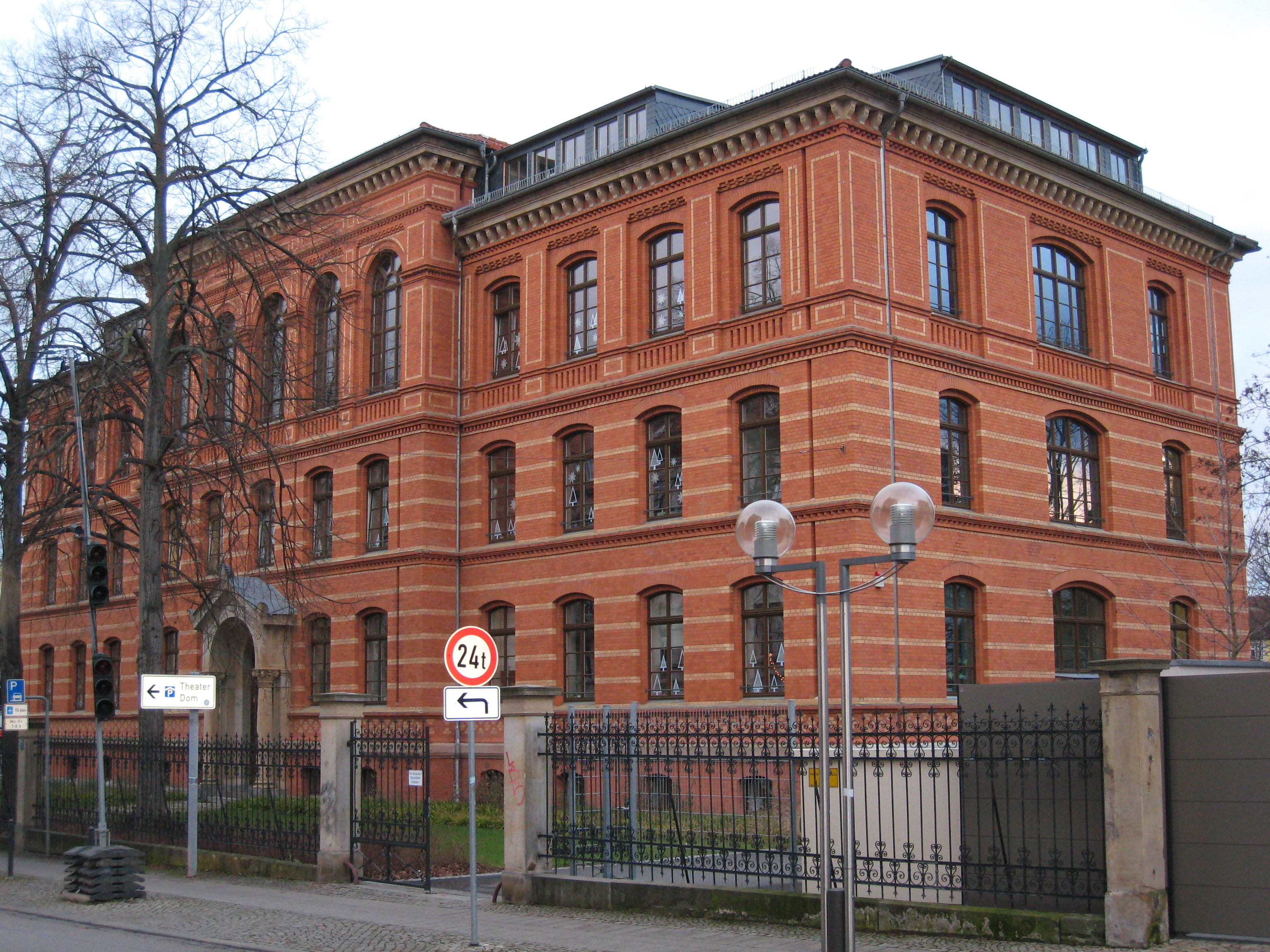 Evangelische Grundschule Erfurt 1, frühere Orthopädische Klinik, Regierungsstraße 42a